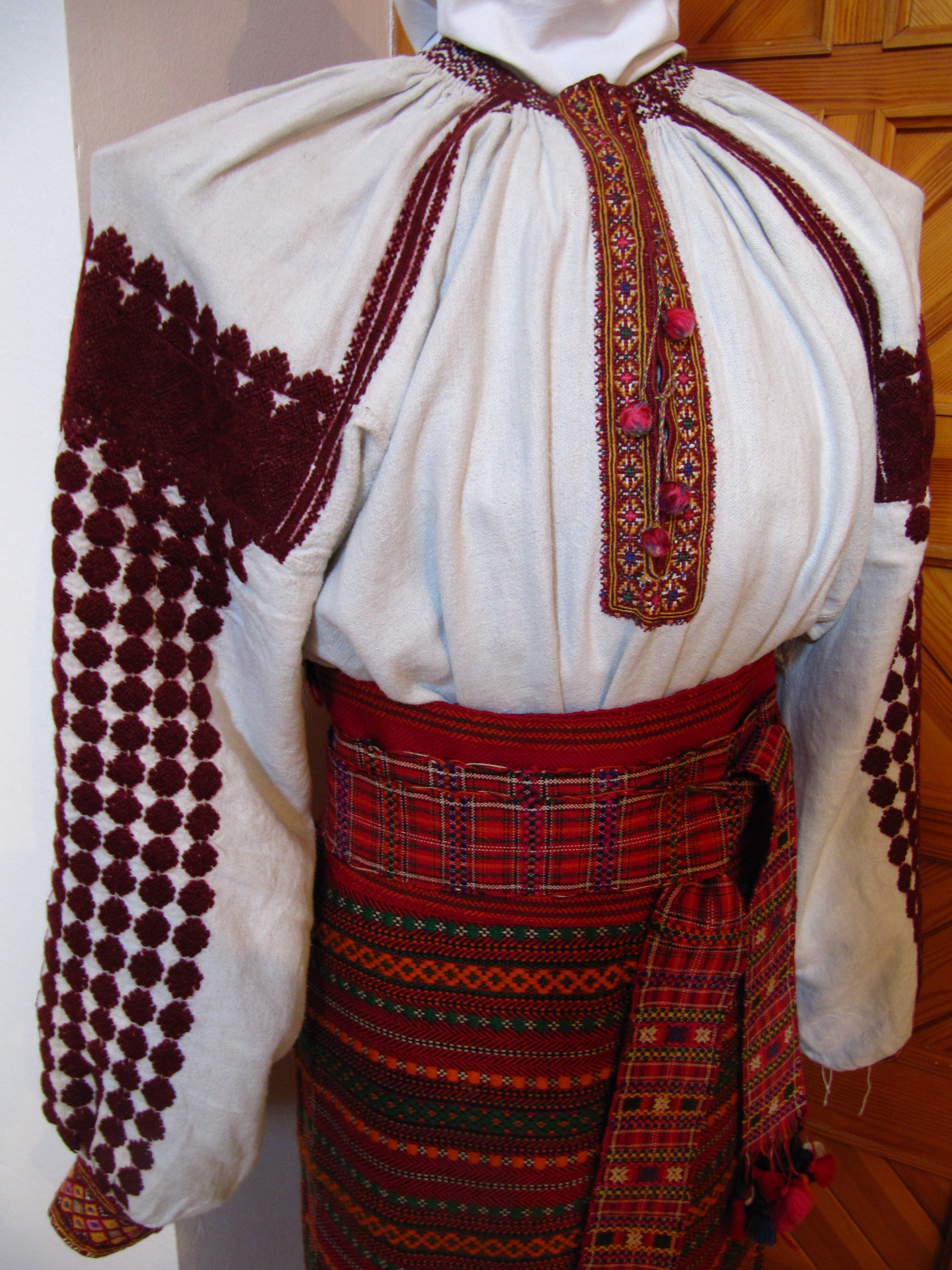 Костюм жіночий. Кінець 19 ст. - початок 20 ст. Івано-Франківська обл. Городенківський р. Виставка в музеї Івана Гончара (Київ).